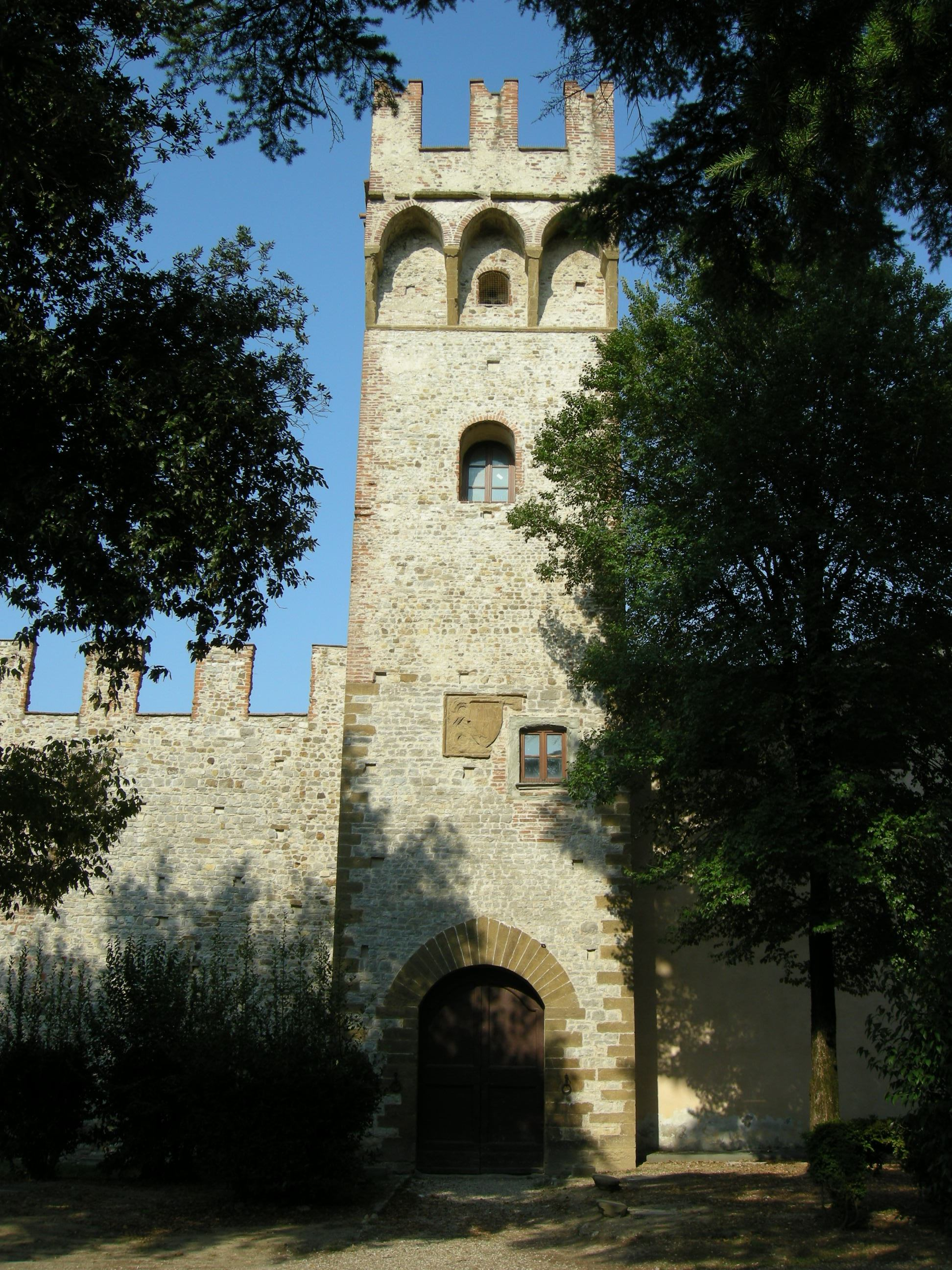 Castello dell'acciaiolo